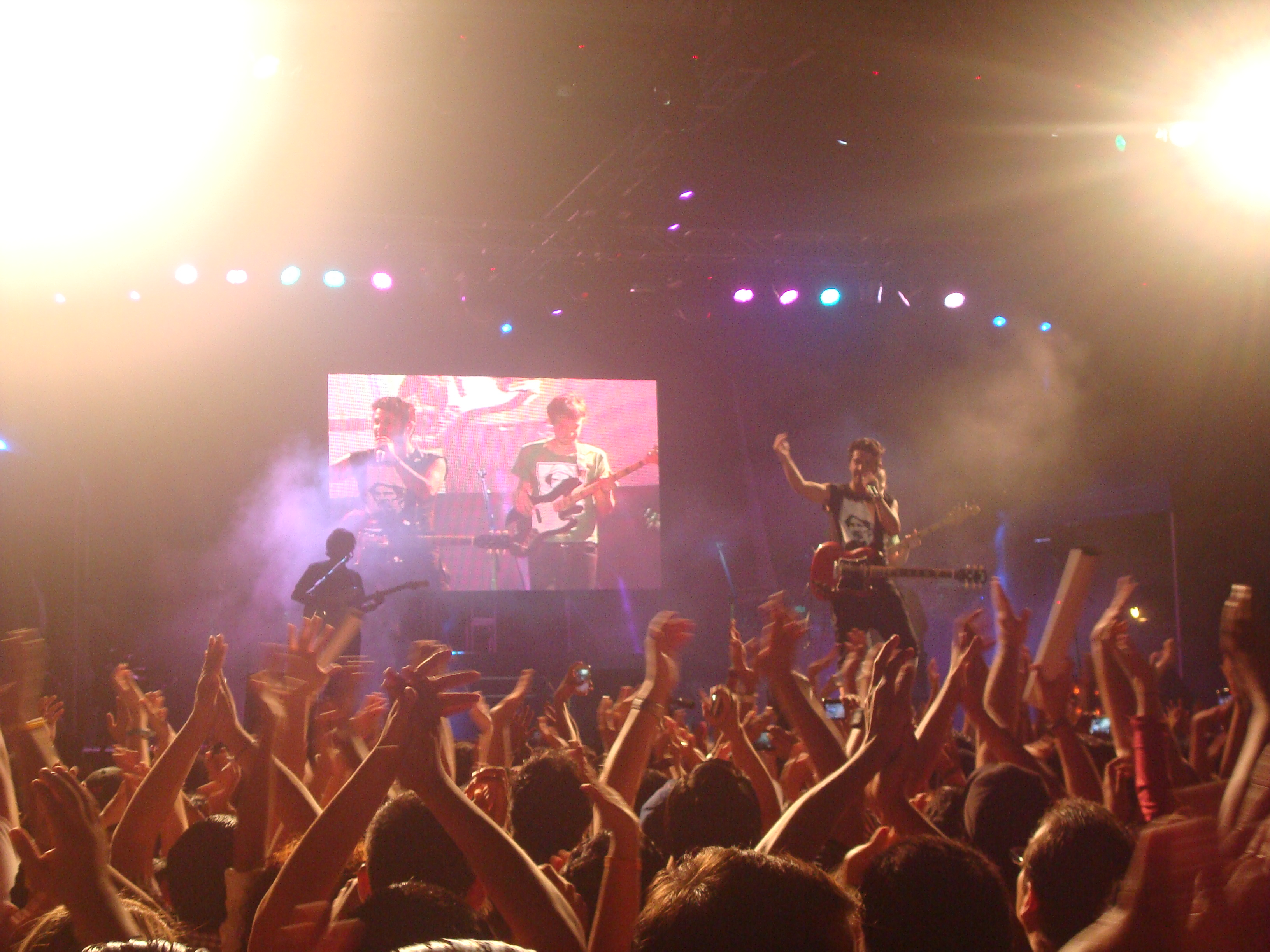 Foto del concierto retorno, Guayaquil (EC), Plaza del MAAC